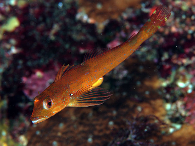 アナハゼ Pseudoblennius percoides